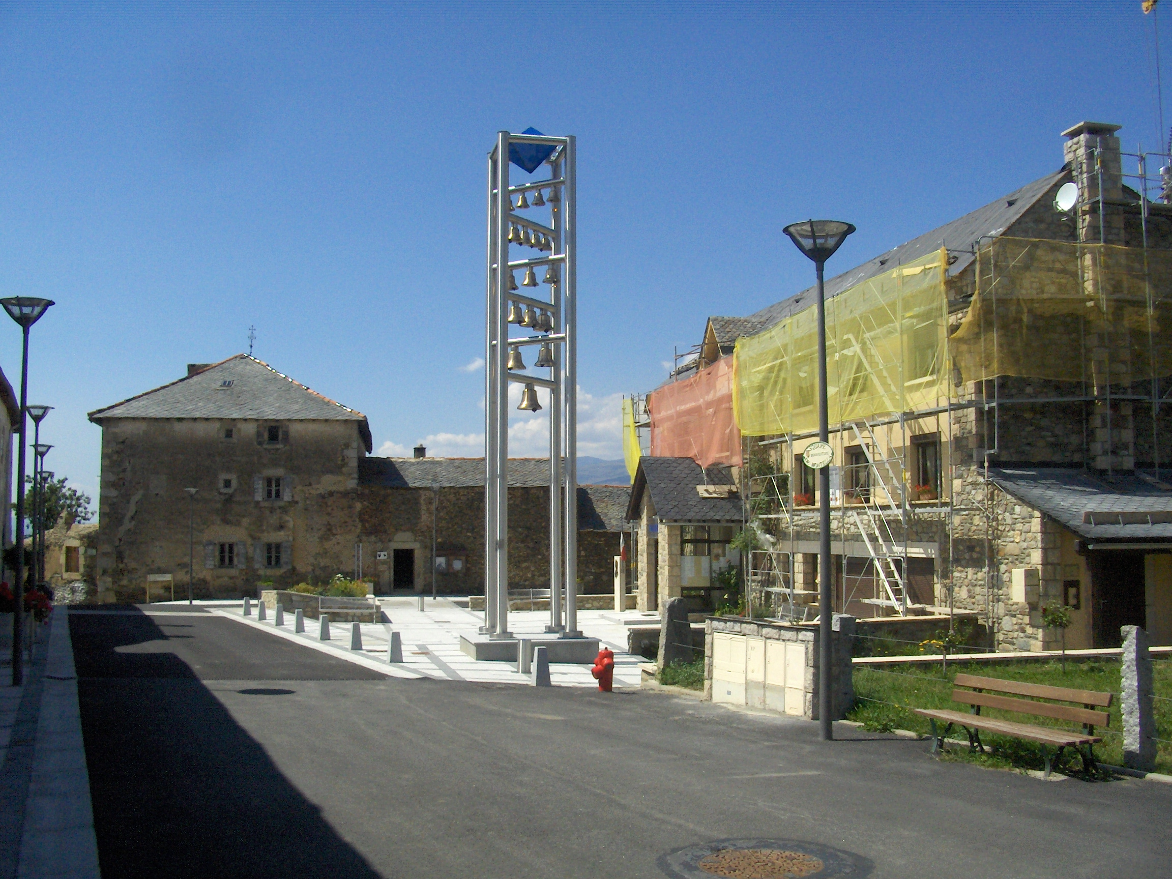 Plaça Michel Aris de Santa Llocaia (Alta Cerdanya). A la dreta hi ha la seu de la comuna. Al fons es pot veure el museu de la masia Cal Mateu.